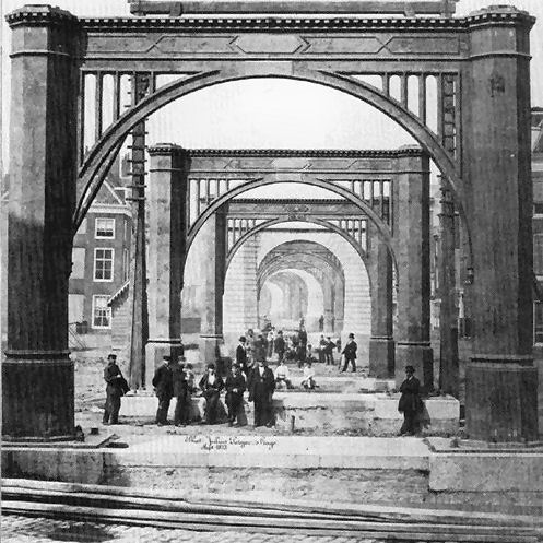 Bouw van het Luchtspoor door Rotterdam. Foto van Julius Perger (1840-1924).